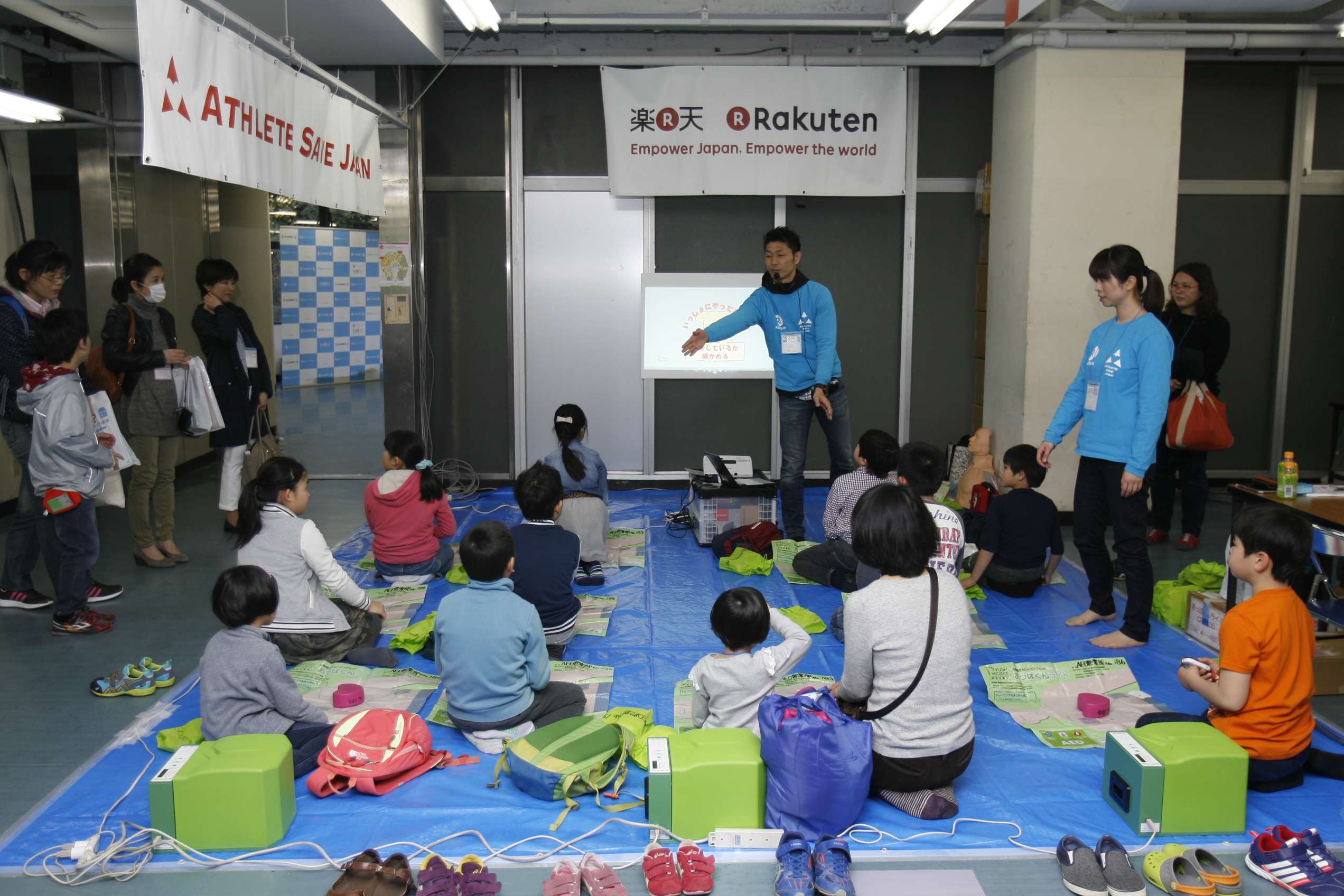 2016年3月29日学びのフェス春の授業風景